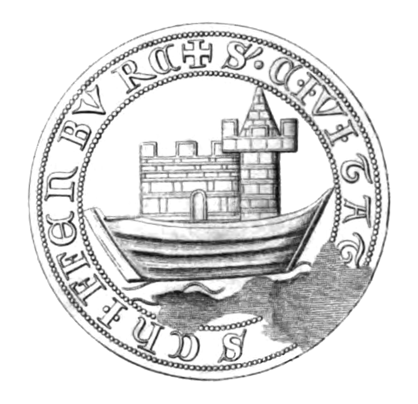 Schippenbeil (früher Schiffenburg), Siegelabdruck der Stadt in Ostpreußen aus dem Jahr 1351 mit der Umschrift S'. CIVITATIS SCHIFFENBURG